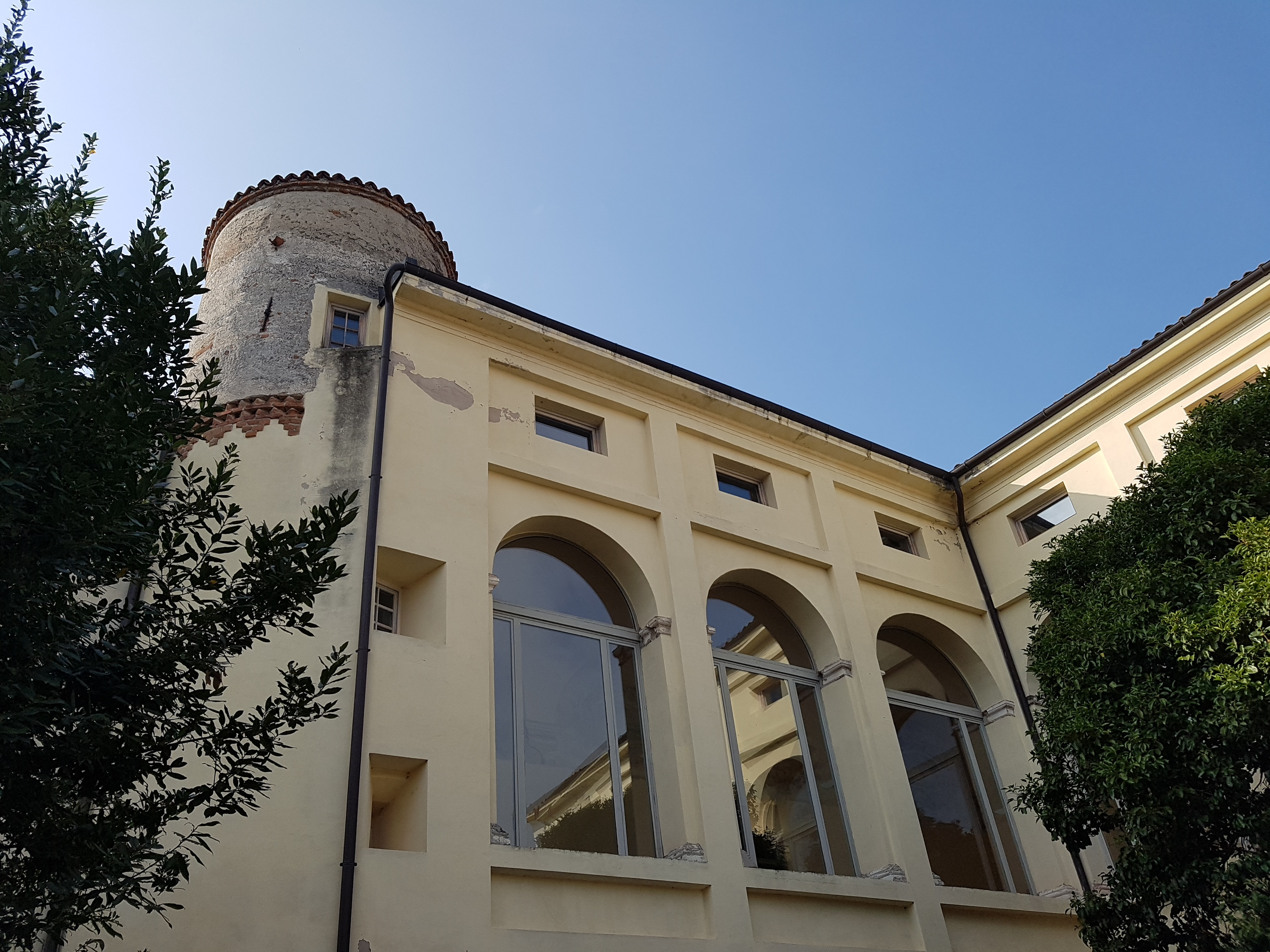 Palazzo Marini, sec. XVII, Borgofranco d'Ivrea, Piemonte